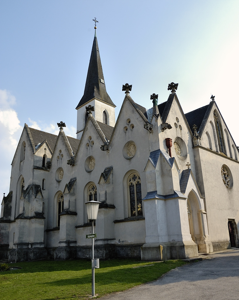 Kath. Pfarrkirche hl. Martin